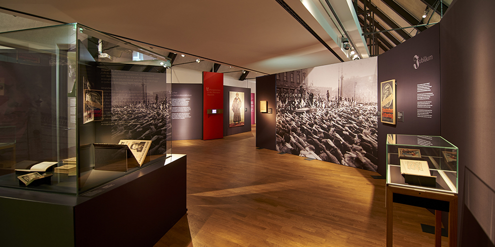 Blick in die Ausstellung "Luther. 1917 bis heute" im ehemaligen Kloster Dalheim.